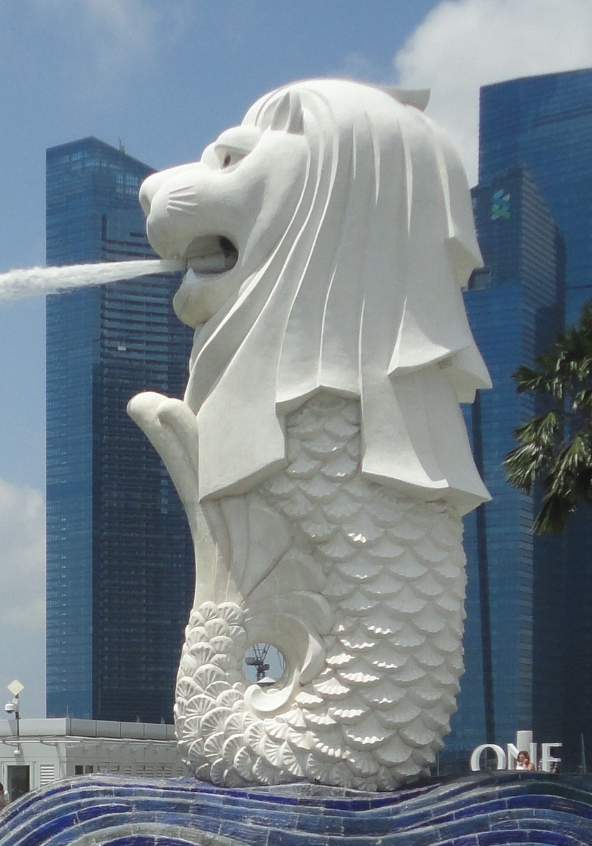 සිංහල: සිංහපුර (සිංගප්පූරුව) සංචාරක ආකර්ෂණය දිනූ සිංහ හැඩැති වතුර මල